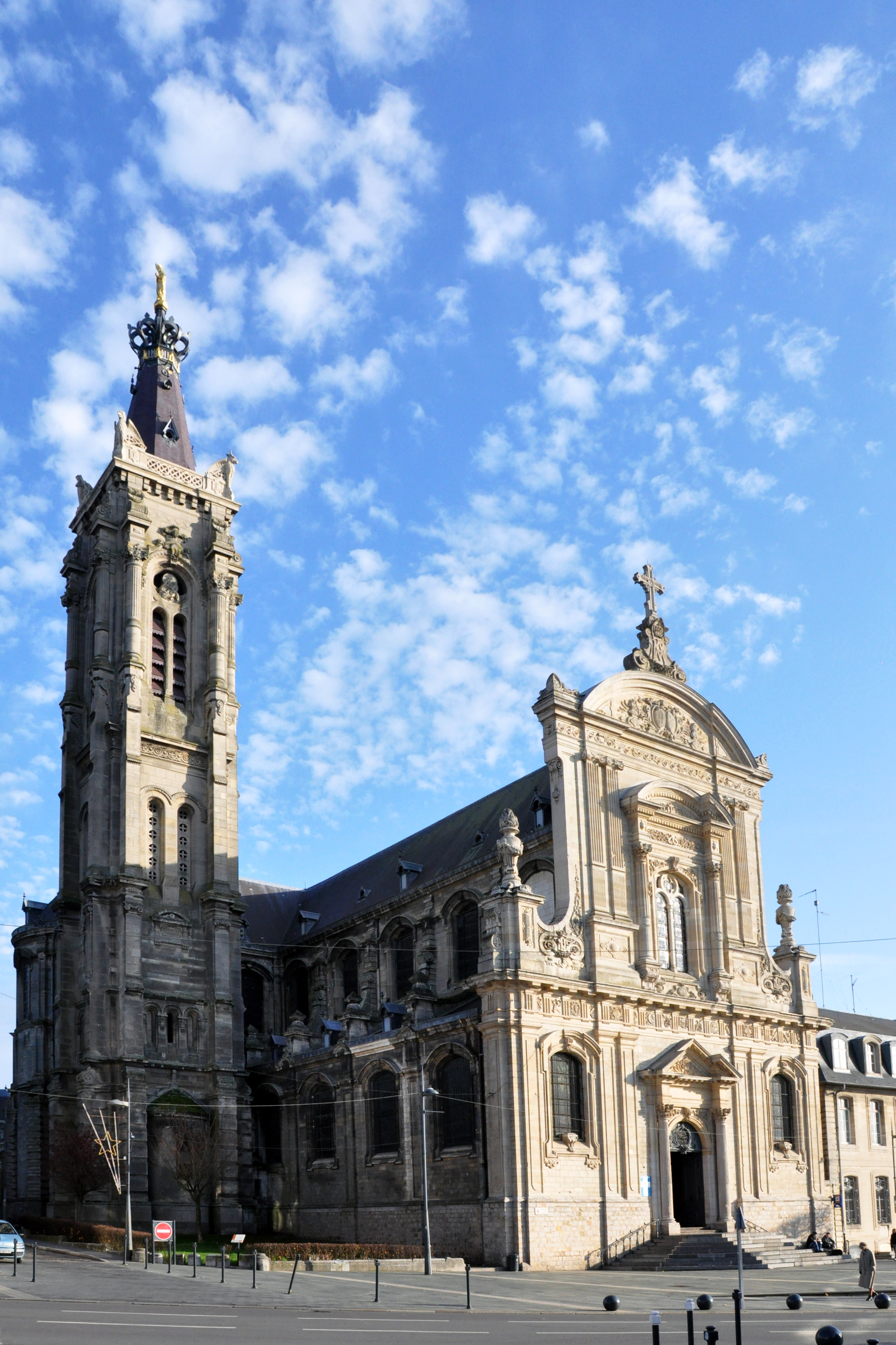 Cathédrale Notre-Dame de Grâce de Cambrai.